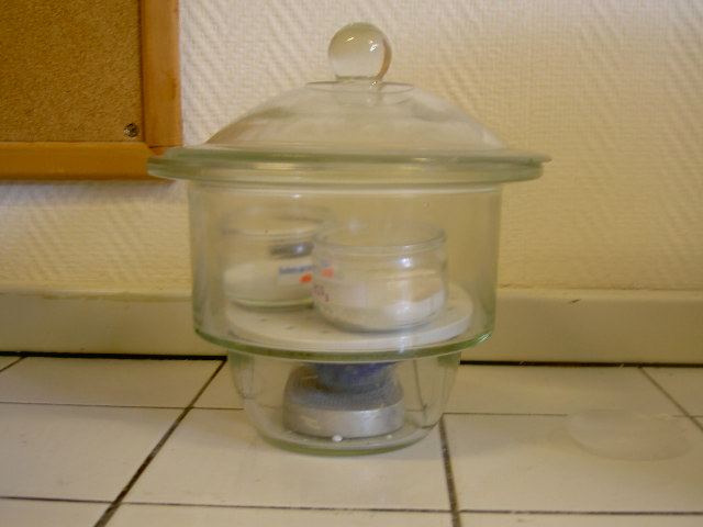 Dessicateur de laboratoire pour la conservation de produits anhydres (au dessus). Le dessicant se situe dans la loge inférieure. Photo prise par Raziel 4 juin 2006 à 17:06 (CEST)